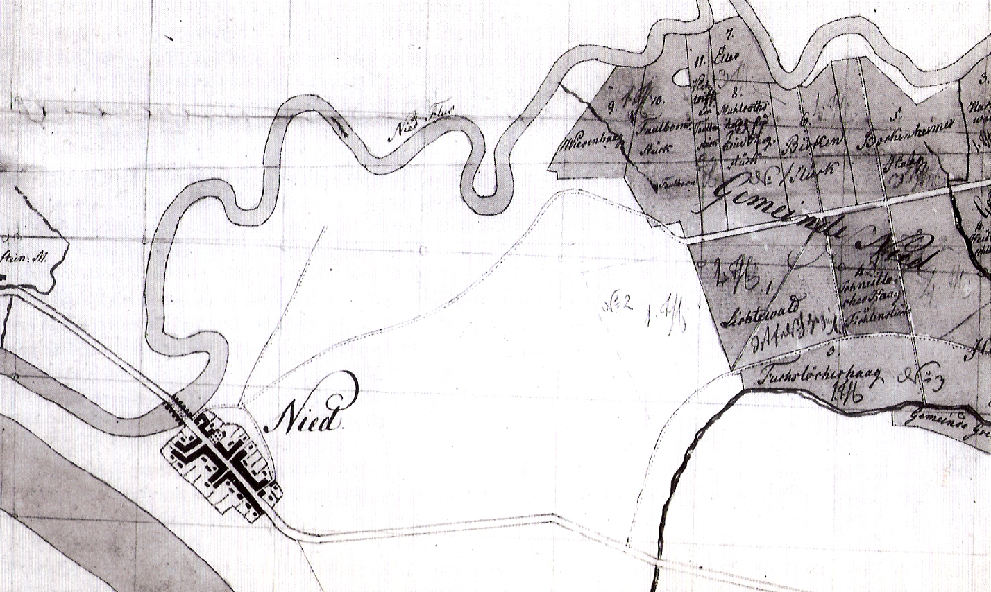 Nied bei Höchst am Main: Lageplan der Gemarkung der Gemeinde, 1810 (Ausschnitt). Angefertigt von Geometer Adam Appel anläßlich der Aufmessung des Nieder Gemeindewaldes. Original im Hauptstaatsarchiv Wiesbaden